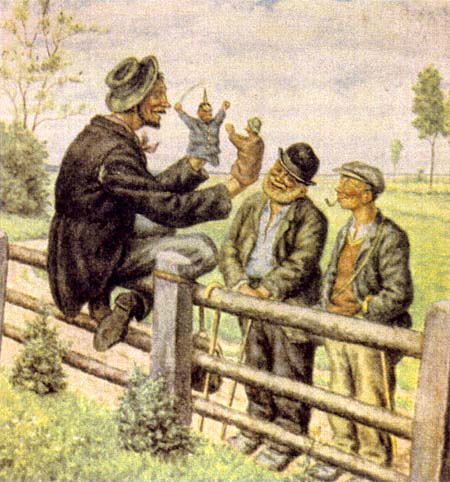 Otto Quante Kasperltheater